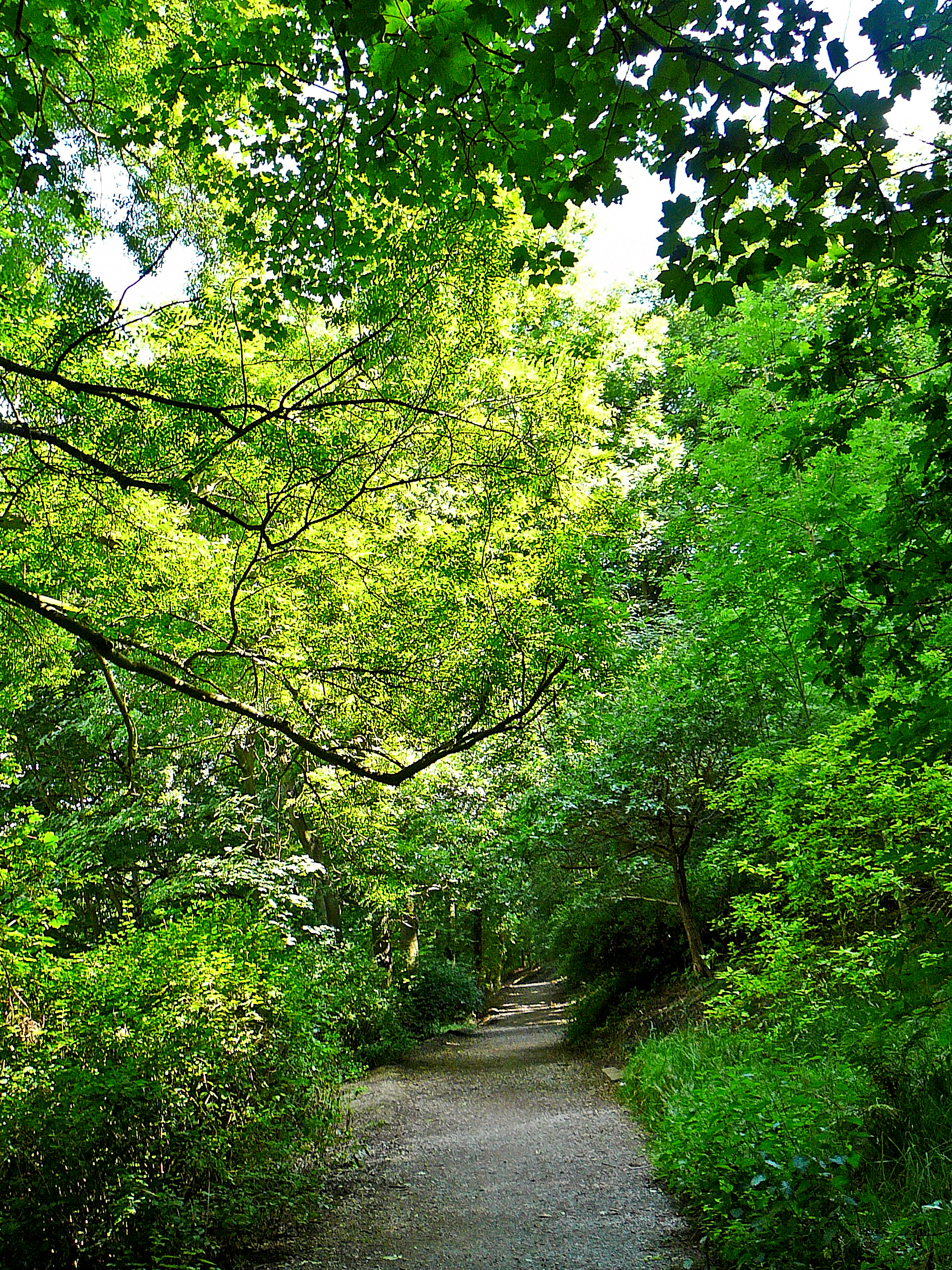 Woodhouse Ridge, Leeds